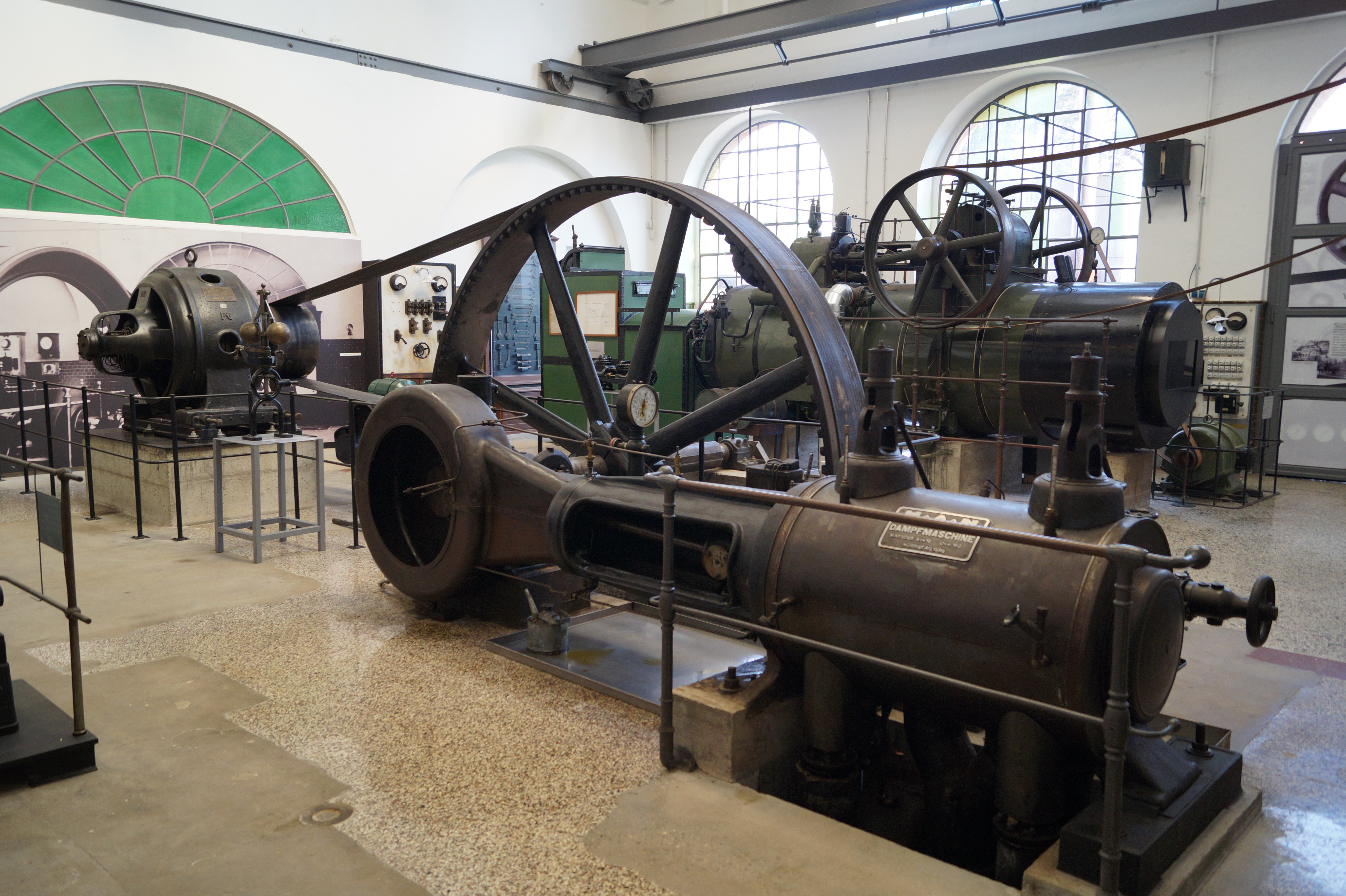 Museum Großauheim, Blick in die Maschinenhalle